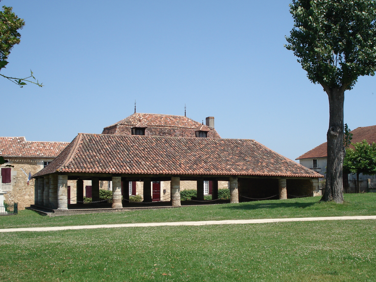 Commune de Beauregard et Bassac